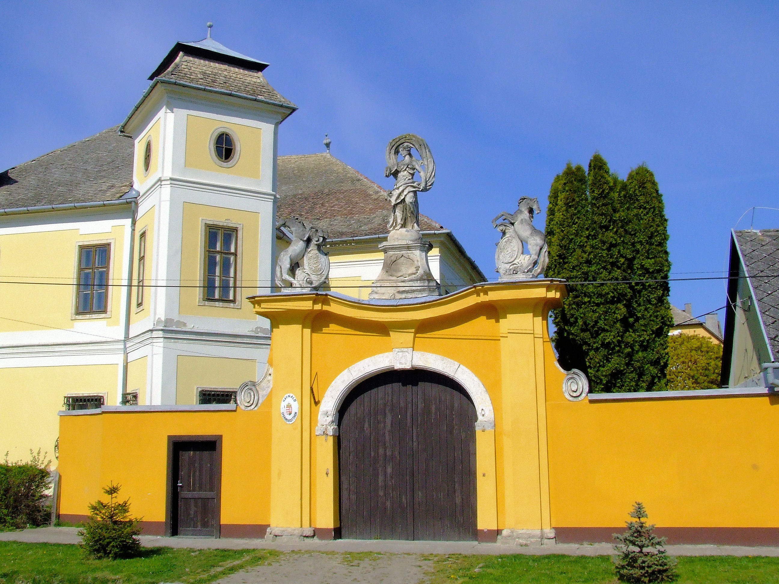 A hajósi érseki kastély kapuja. Építette a kalocsai érsek 1739-ben